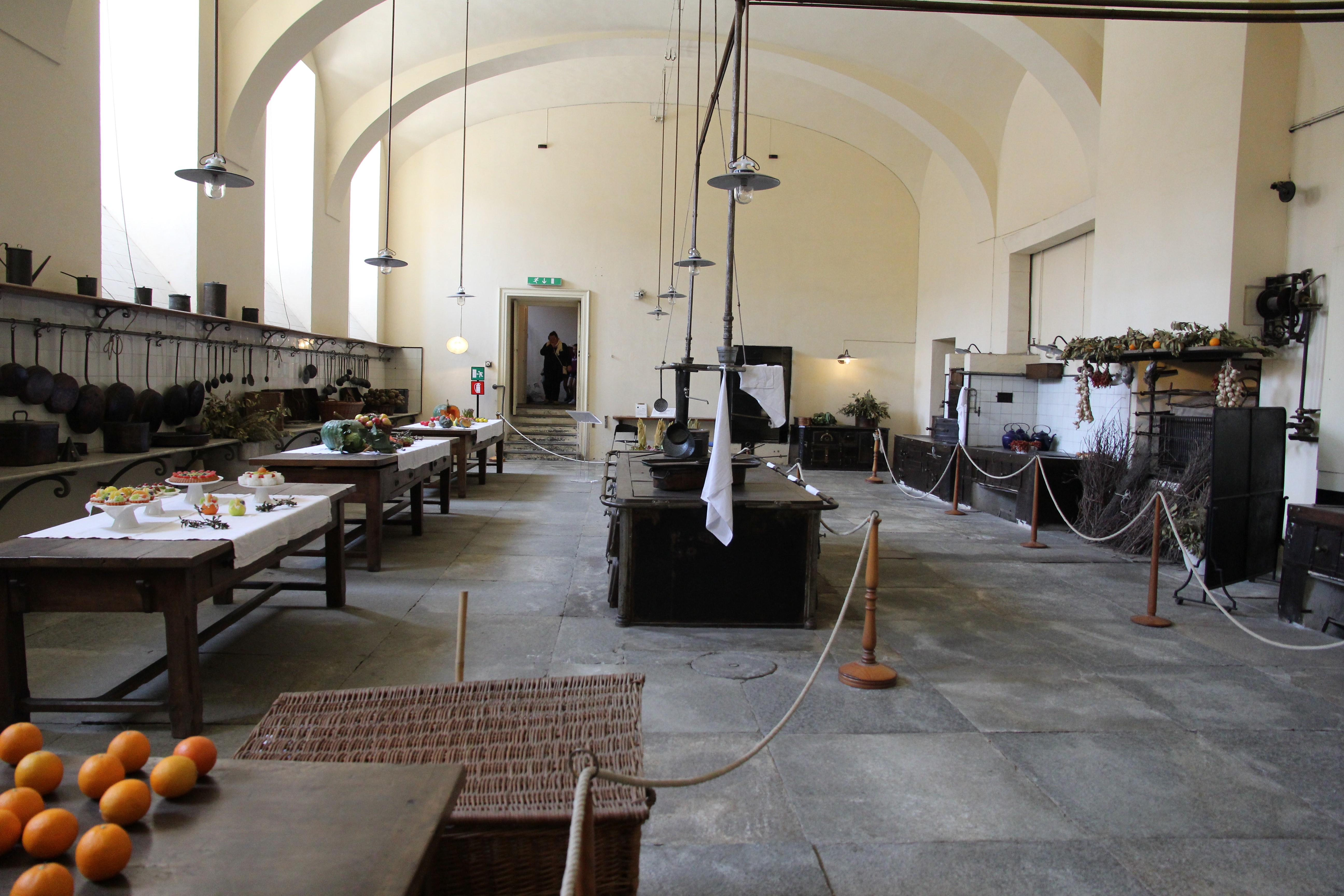 Racconigi, il castello reale